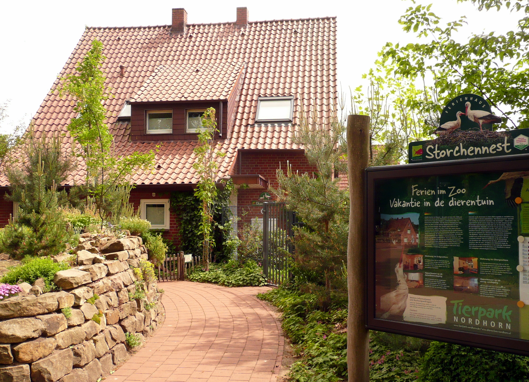 Haus Storchennest